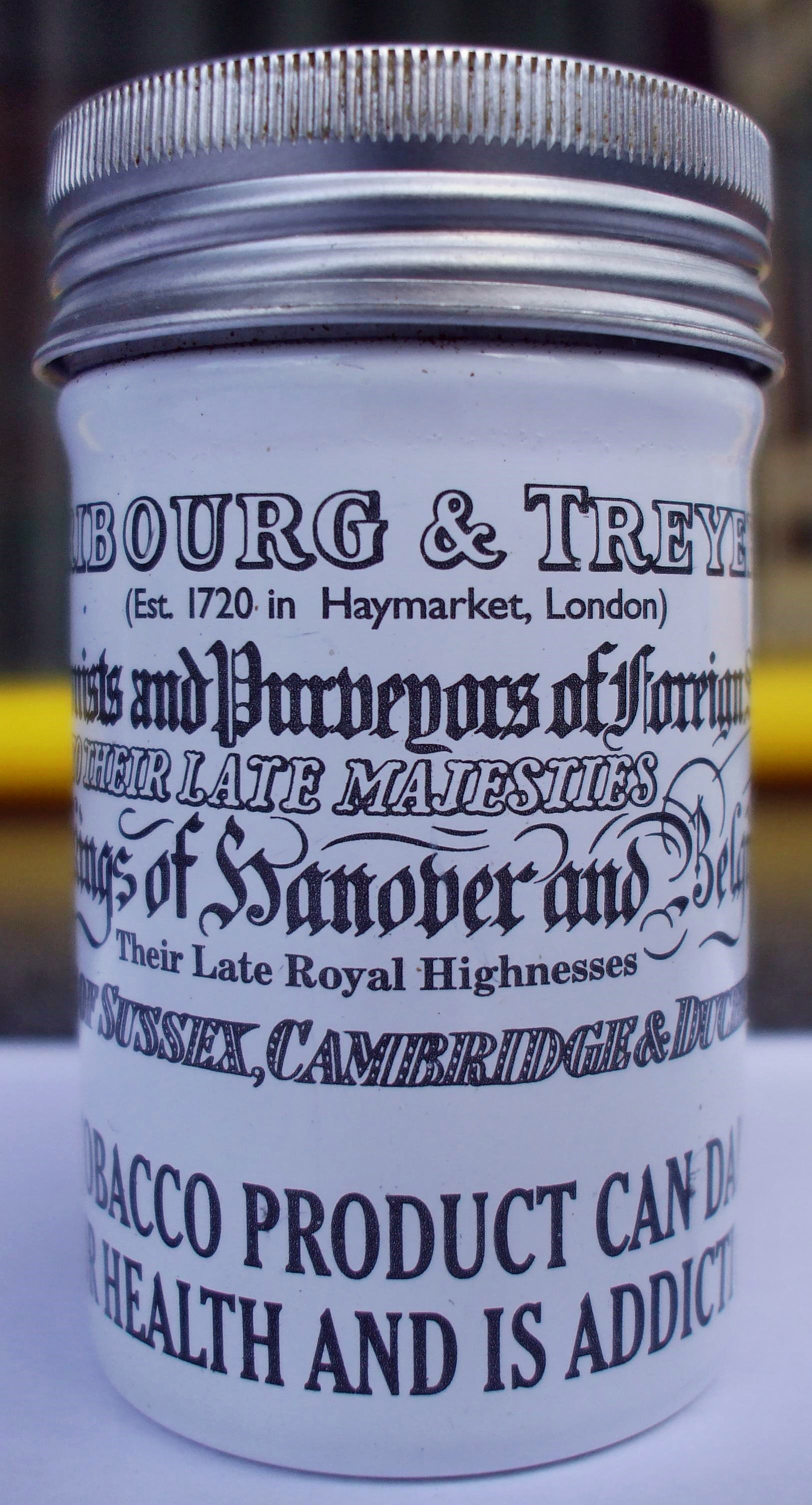 Fribourg & Treyer Snuff